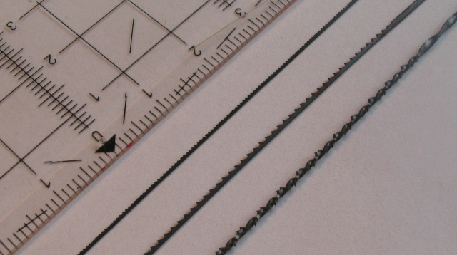 Description Metaalfiguurzaagjes Eigen werkOther versions Geen Metaalfiguurzaagjes